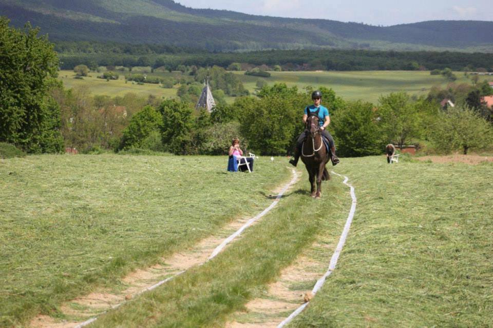 la MA